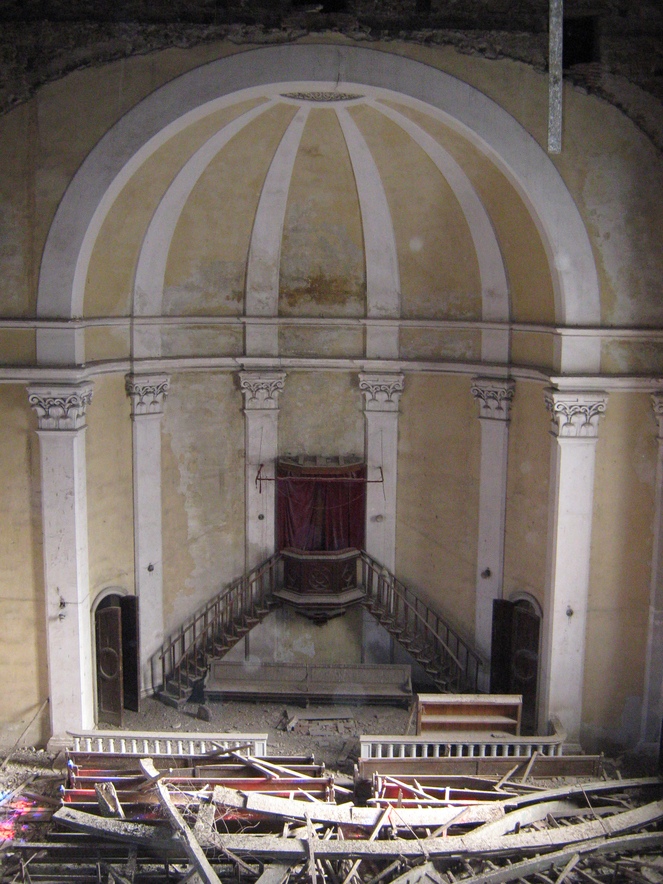 Tempio della Congregazione Olandese-Alemanna, Livorno